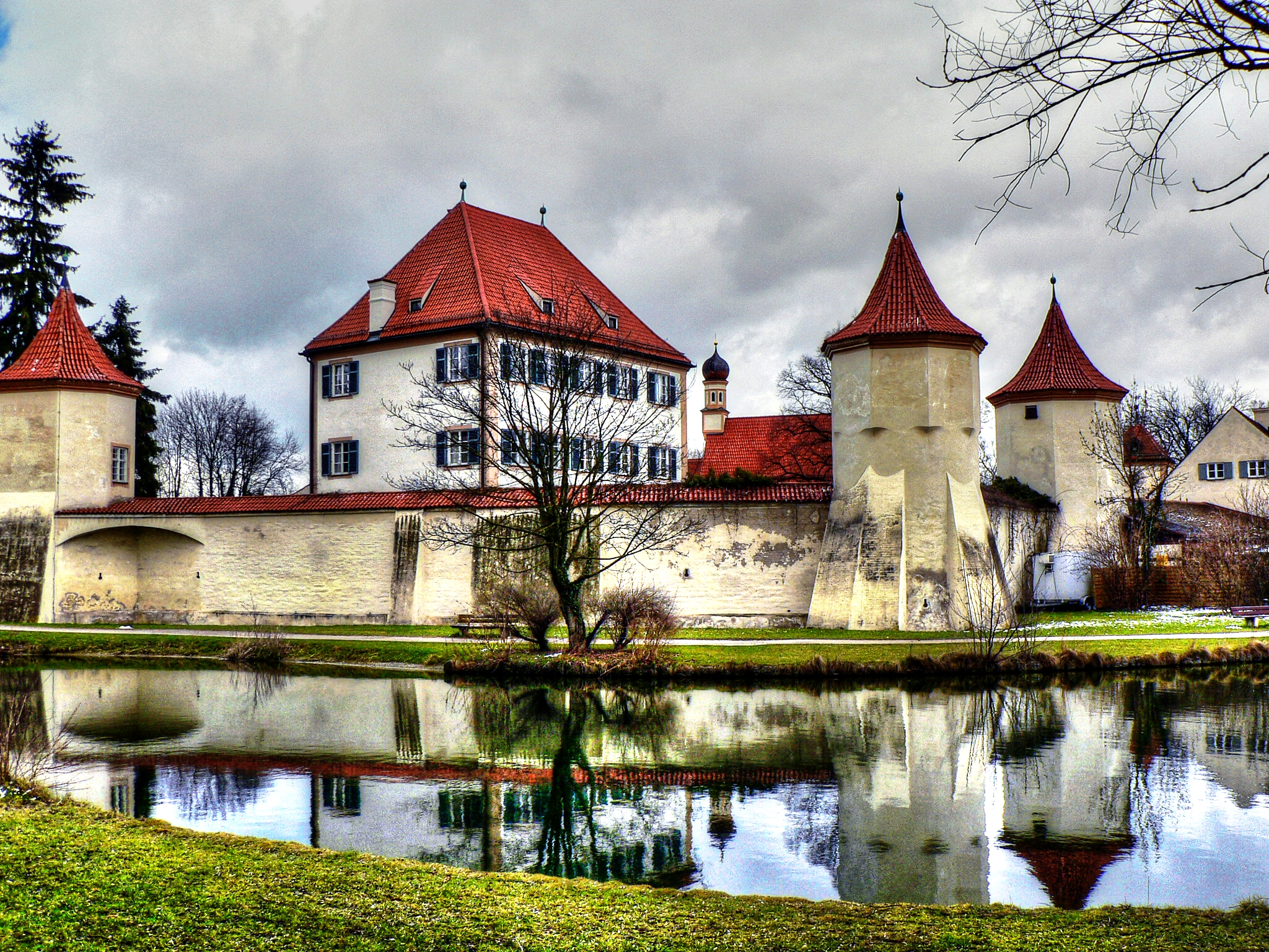 Erste Erwähnung fand die Wasserburg unweit von München, 1425 in der Regesta Boica XIII als Blyutenburg. Entstanden ist die Anlage aber schon im 13. JH wahrscheinlich als eine von der Würm (kleiner Fluss im Westen Münchens) umflossenen Motte mit einem steinernen Wohnturm. Nach 1431 wurde die Pluedenburg, wie sie da hieß, von Herzog Albrecht III zu einem Landsitz ausgebaut. Den 30 jährigen Krieg bestand sie unbeschadet, auch wenn oft zu lesen ist, dass sie zerstört wurde. Nach wechselnden Besitzer waren in der Burg bis 1957 das Institut der englischen Fräulein danach der Altersruhesitz der Schwestern des dritten Ordens. Danach war die gesamte Anlage ruiniert, unbewohnbar und fast eine Ruine. 1974 wurde von Obermenzinger Bürger 'Verein der Freunde Schloss Blutenburg' gegründet, der sich in der Folge für den Erhalt und den Wiederaufbau stark engagierte und ab 1980 umfangreiche Sanierungsmaßnahmen durchführten.